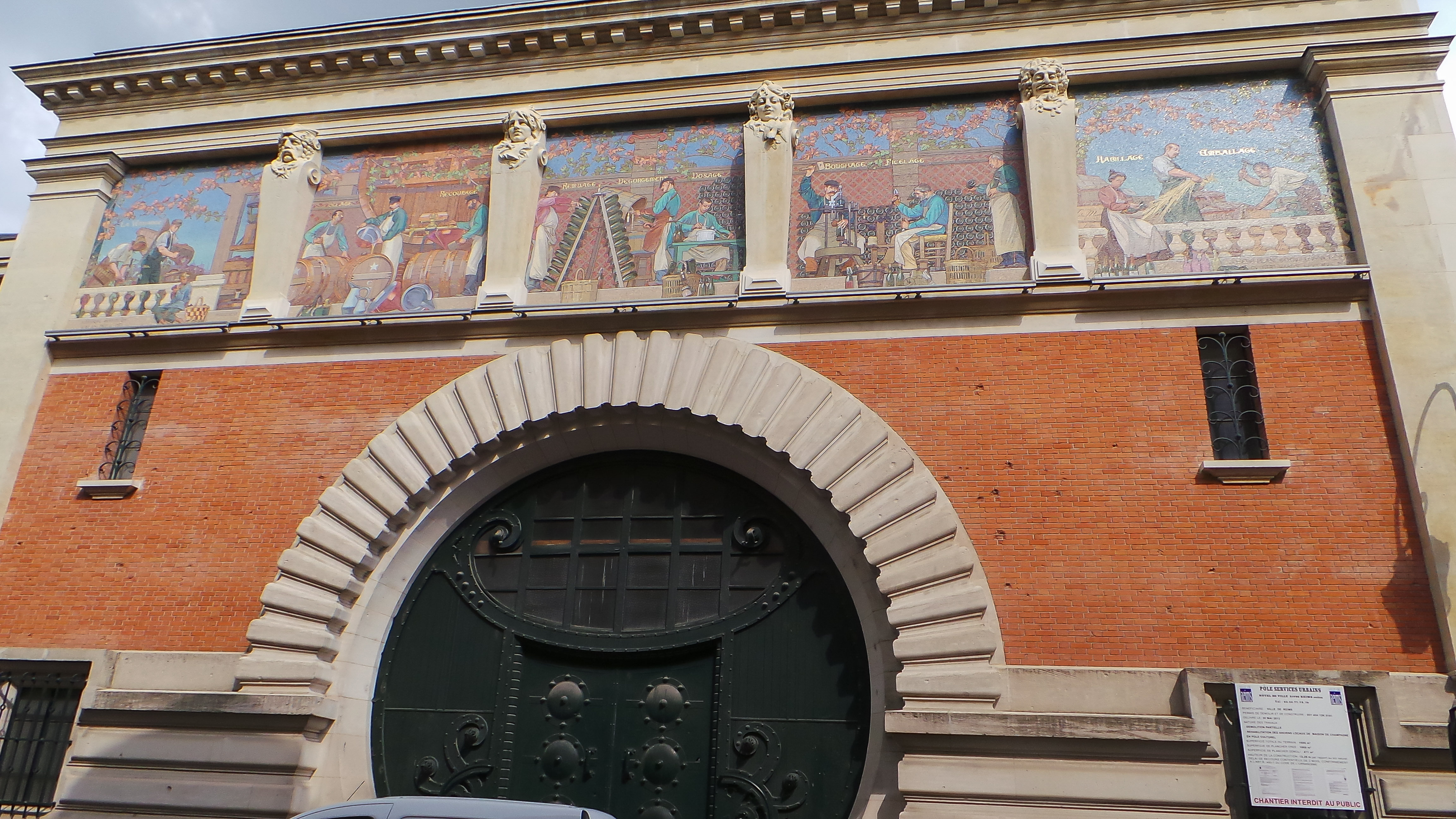 La façade du cellier d'expédition Mumm à Reims / Reims, Marne, France